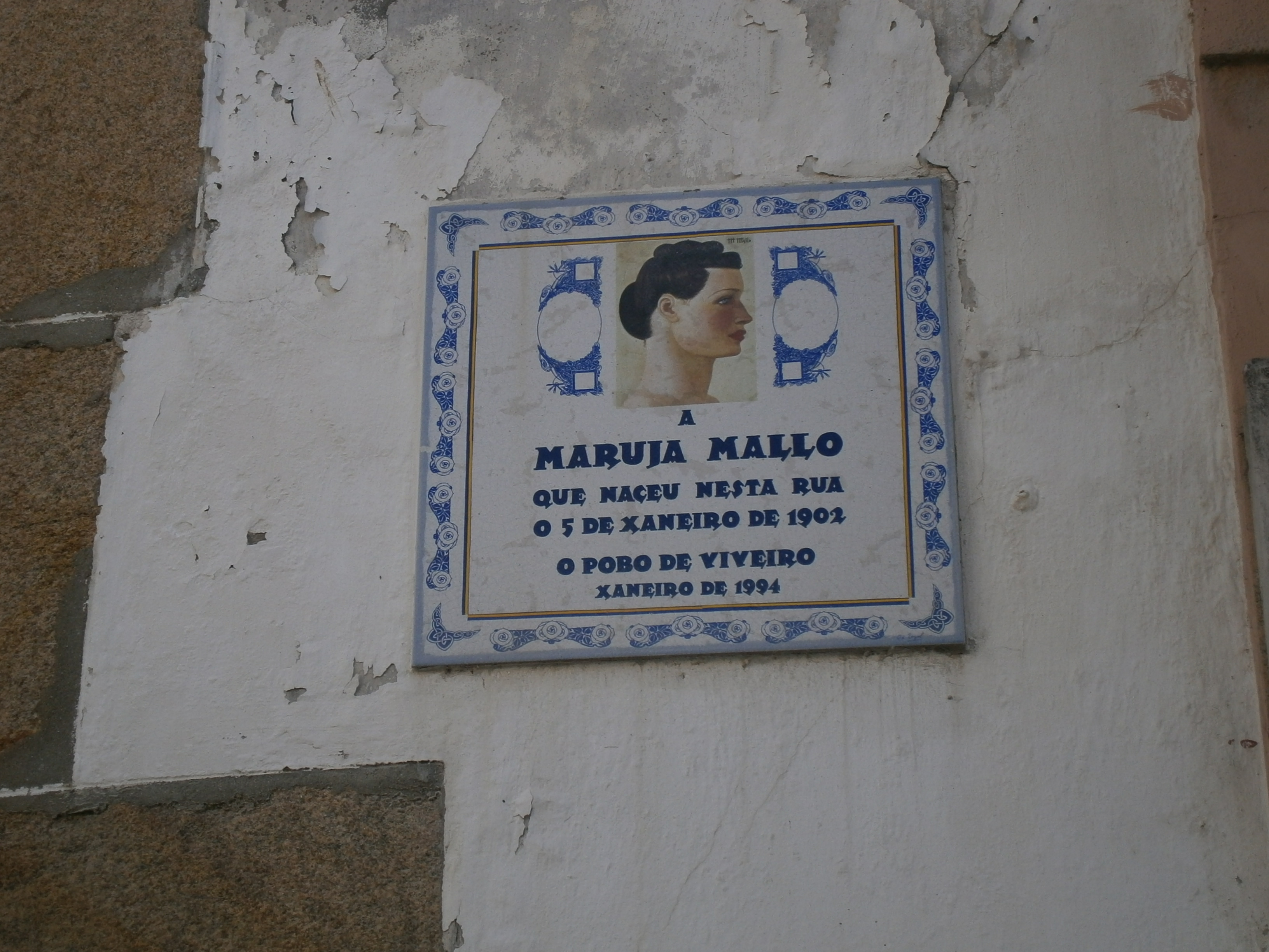 Placa de homenaxe a Maruxa Mallo en Viveiro